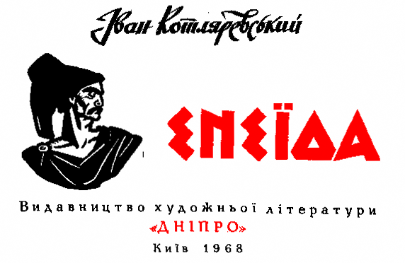 Це скан із книжки І.Котляревського "Енеїда".